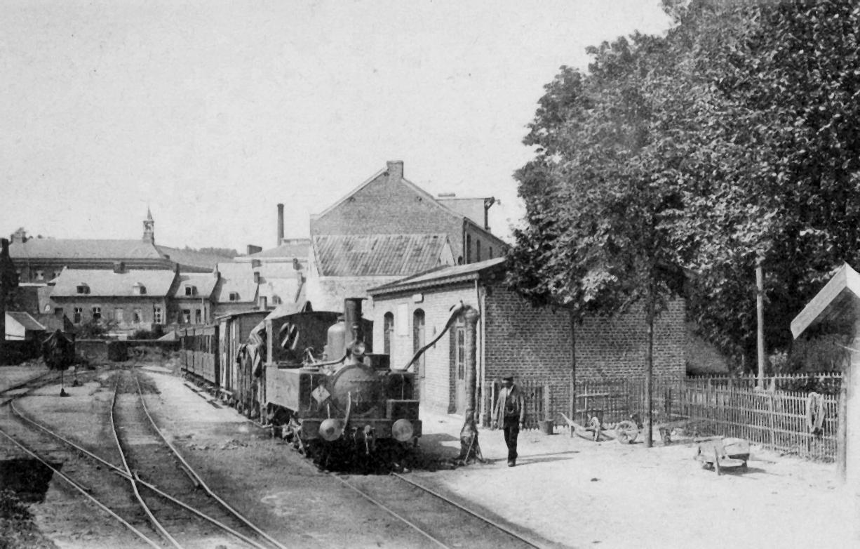 Carte postale ancienne d'éditeur inconnu (timbre-poste oblitéré en 1903) Le Cateau-Cambrésis - la gare terminus du Chemin de fer du Cambrésis et un train